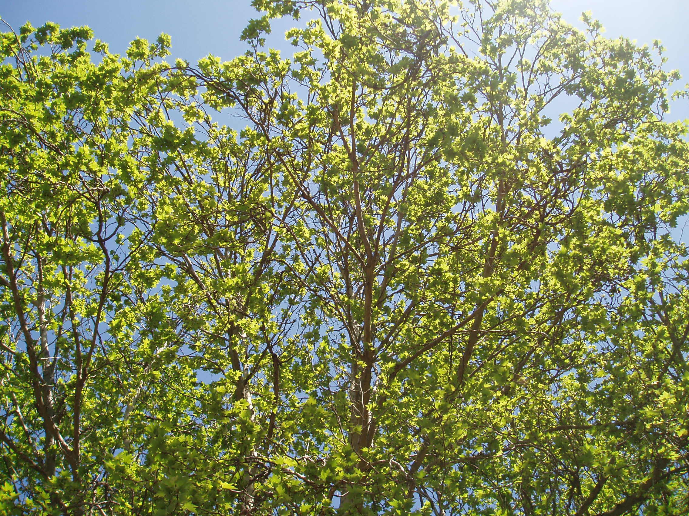 Platanus × hispanica leaves